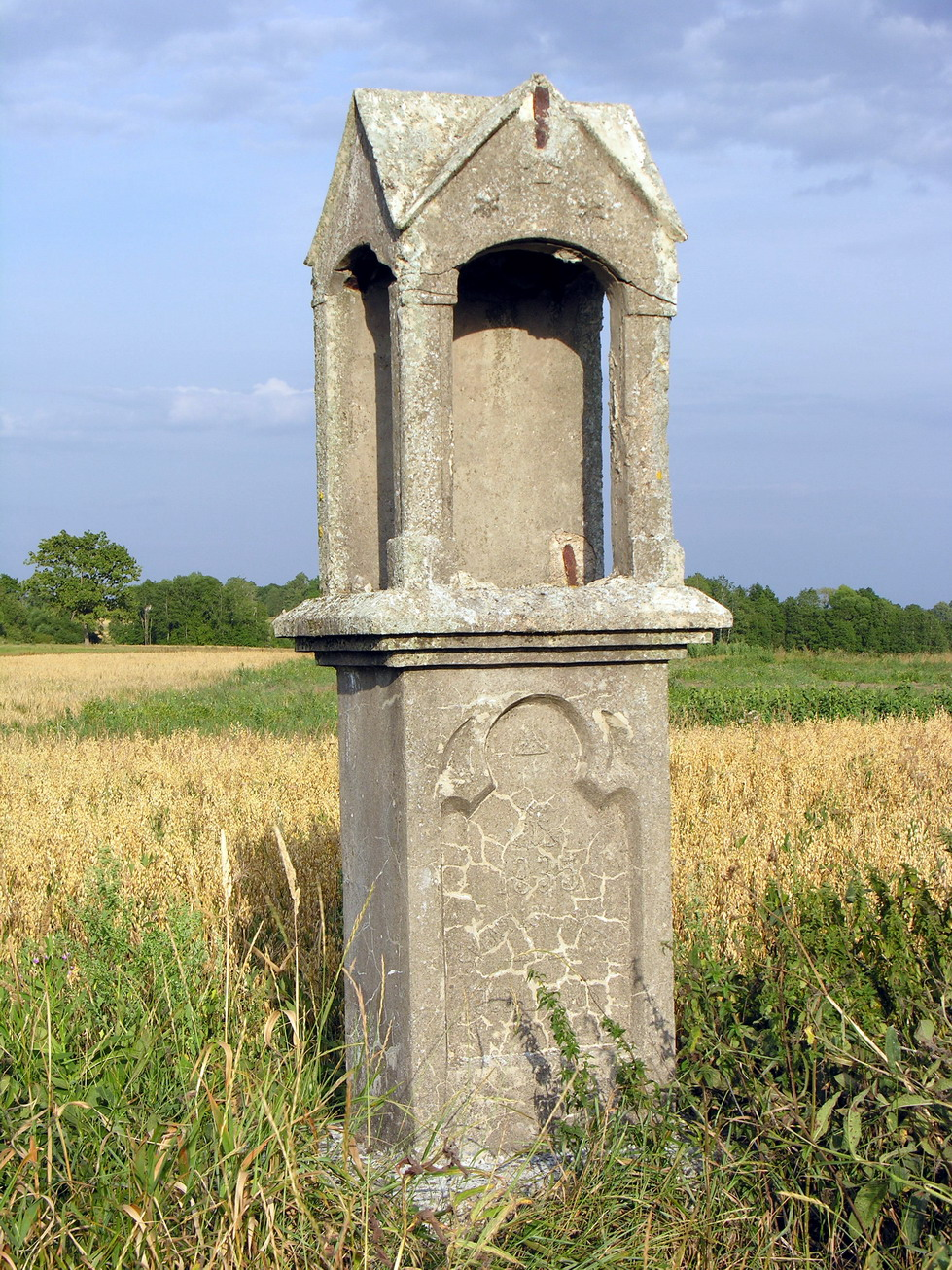 Padvariai, Mažeikių rajonas, Viekšnių seniūnija Apleistas koplytstulpis (past. 1935 m.) Padvarių kaimo laukuose. Foto: Algirdas, 2006 m. rugpjūčio 11 d., Lietuva